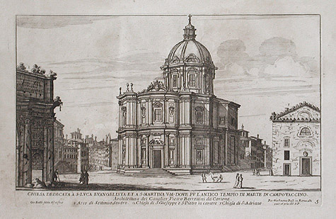 View of Santi Luca e Martina (Rome), engraving by Giovanni Battista Falda, 1670 ca.